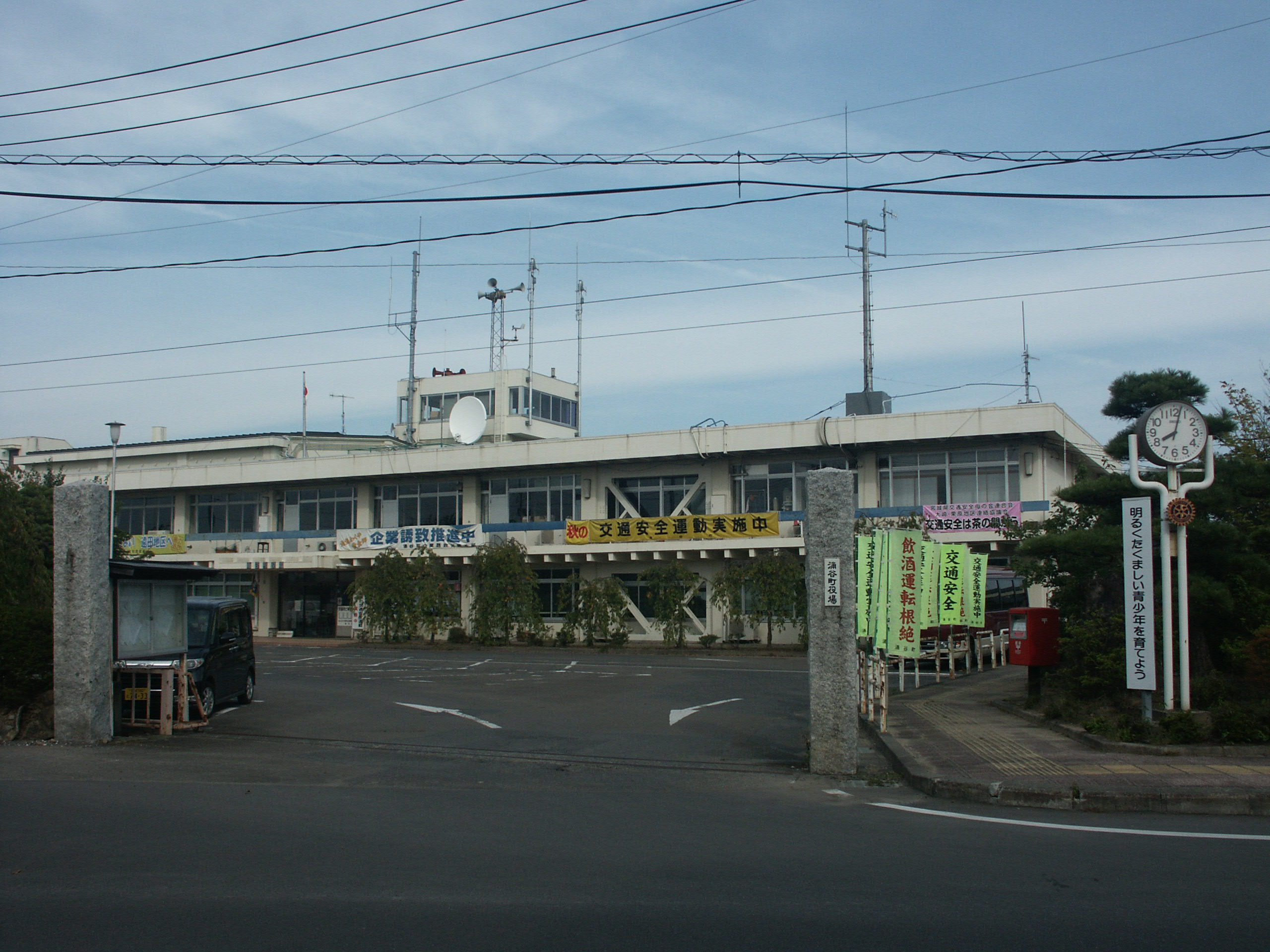 涌谷町役場庁舎